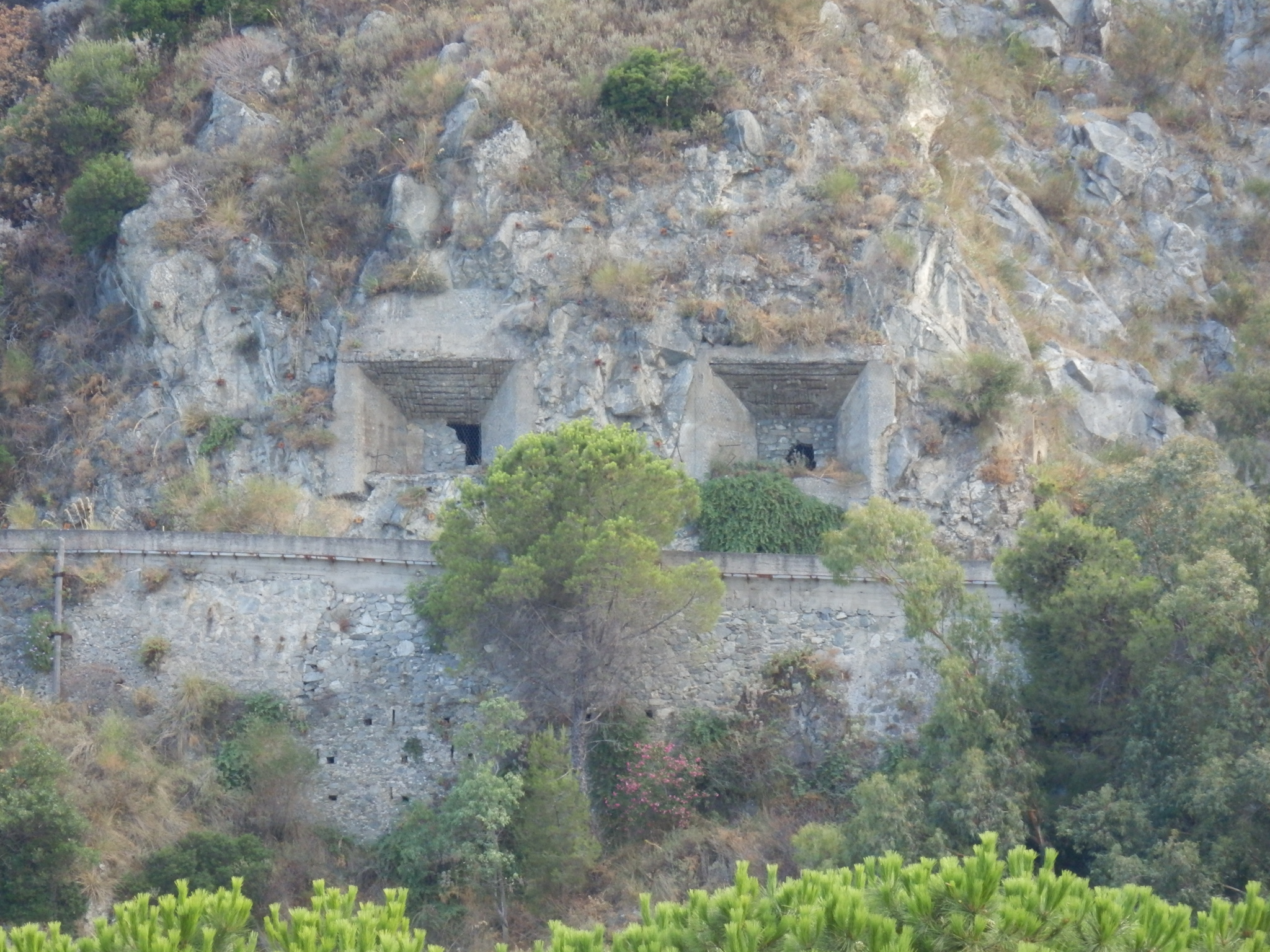 Les fortifications de la 39-45